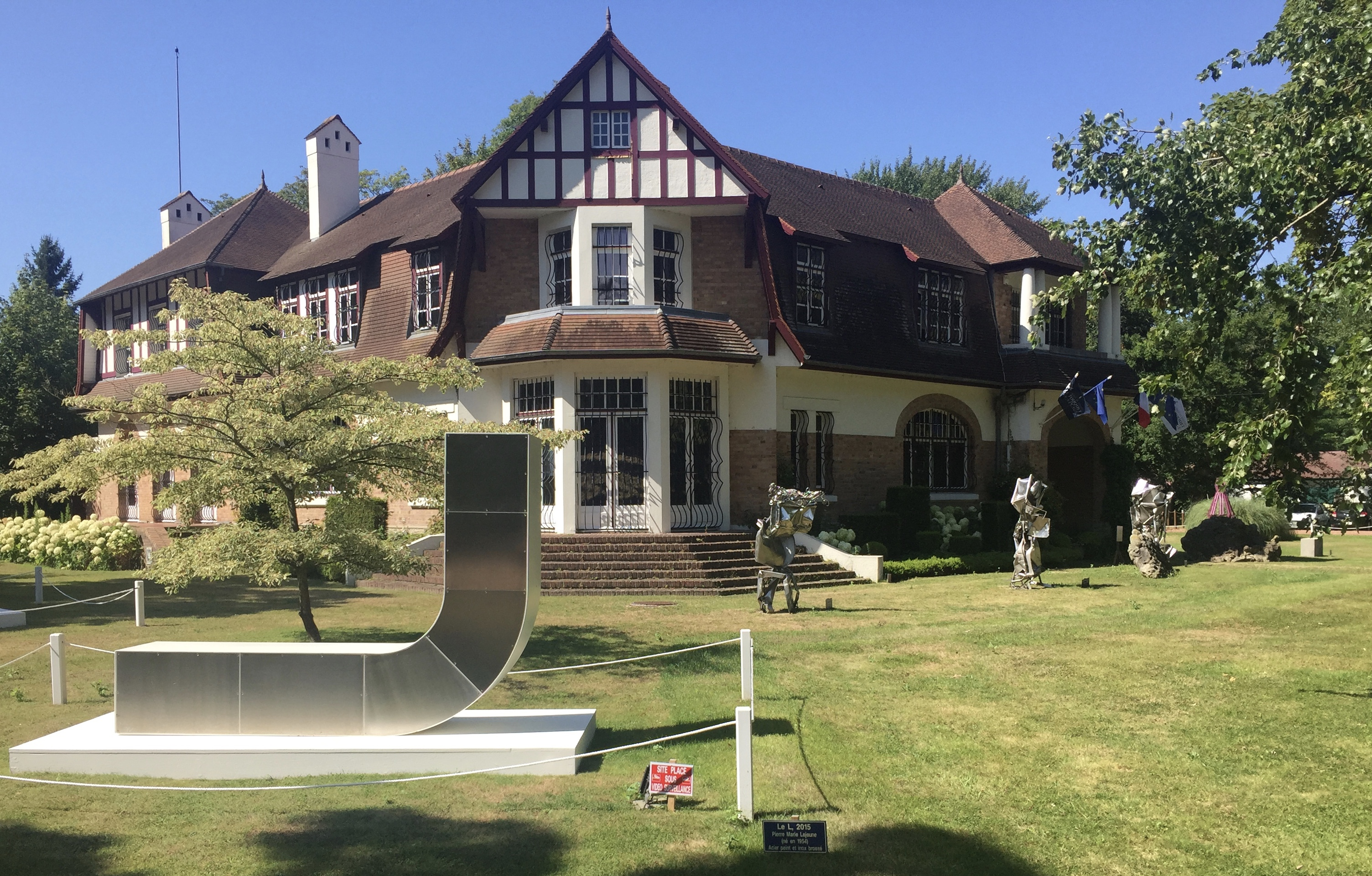 Musée du Touquet-Paris-Plage - angle nord-ouest des avenues du Golf et du Château (2).